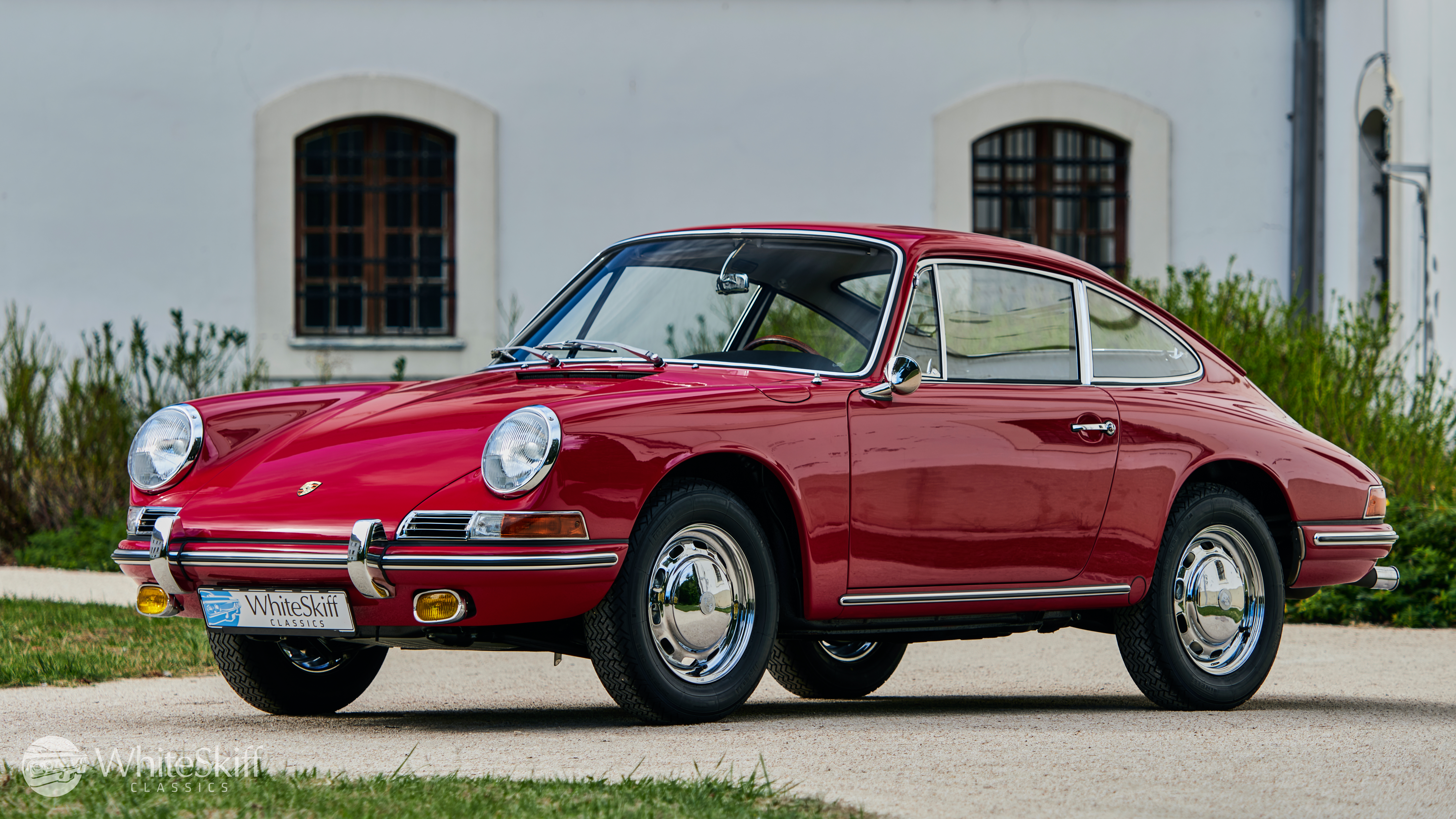 1966 Porsche 911 pólópiros Batthyány-kastély Bicske